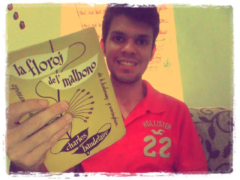 Paulo Silas e o livro La Floroj de la Malbono - Charles Baudelaire